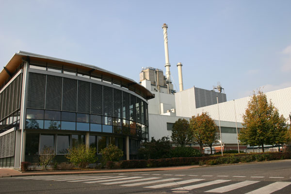 Die Zuckerfabrik in Elsdorf (in 2007)